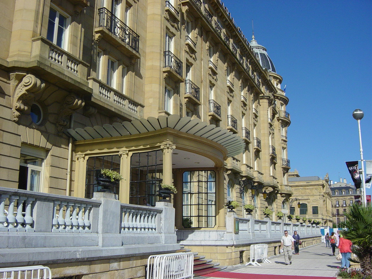 Imagen del Hotel María Cristina durante el Festival Internacional de Cine de San Sebastián (San Sebastián, España)